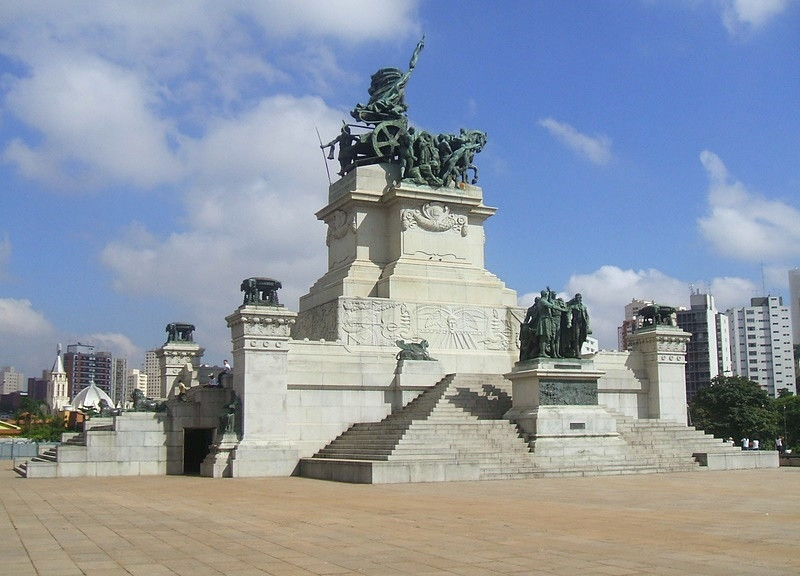 Monumento à Independência, de Ettore Ximenes. Vista lateral. Parque da Independência, São Paulo, Brasil.